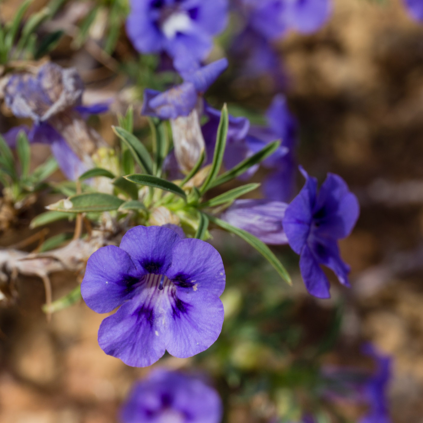 Blepharis spinescens 1-1-0268